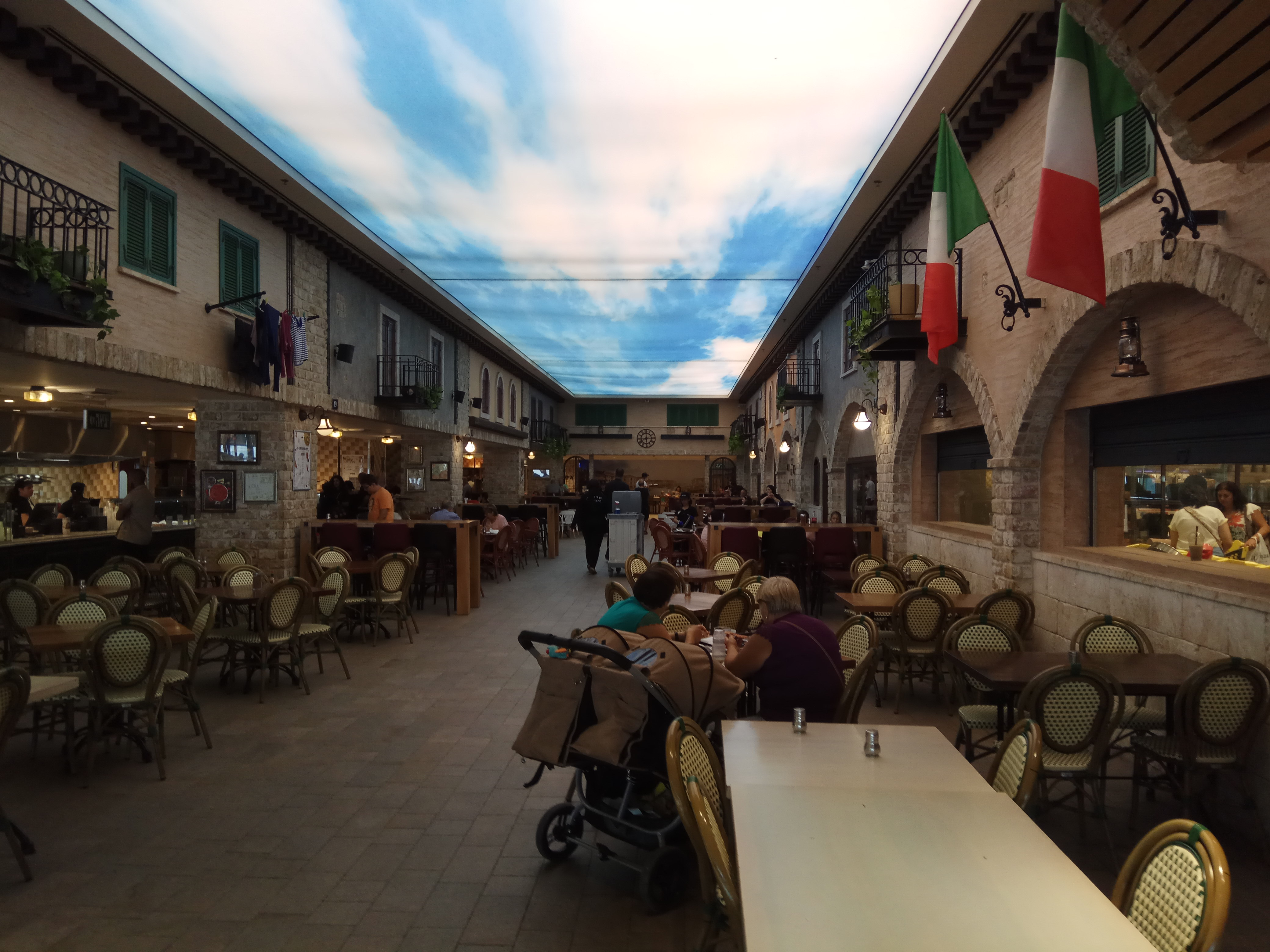 מרכז המזון בנצרת עילית